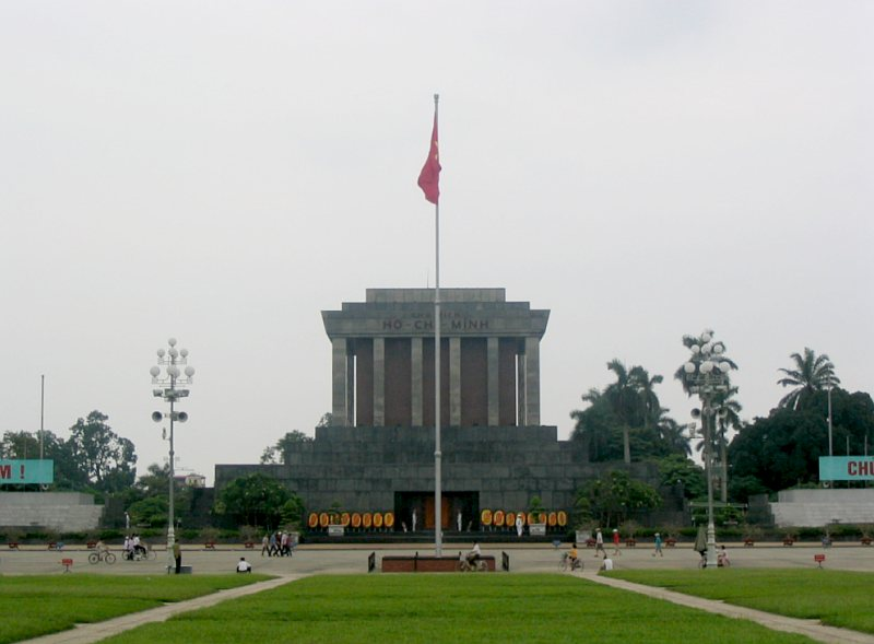 Description: Le mausolée de Hồ Chí Minh. Source: Camille Harang